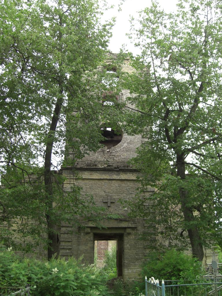 Кирха в Шпаньково (Россия, Ленинградская область, Гатчинский район)